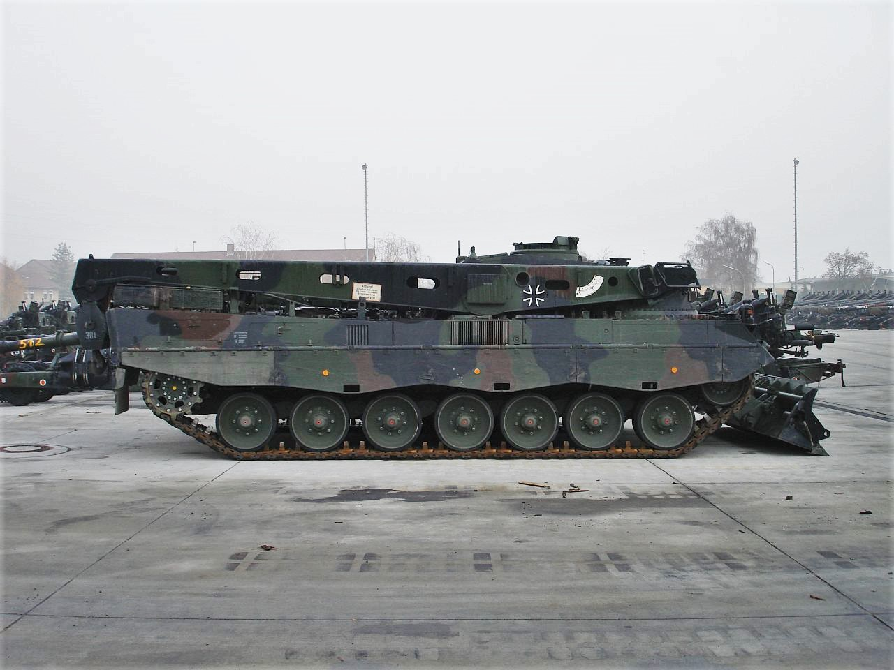 Bergepanzer 3 "Büffel" rechte Seite